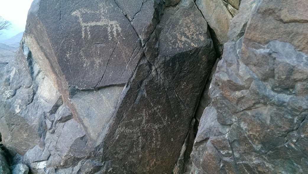 نقوش صخرية قديمة